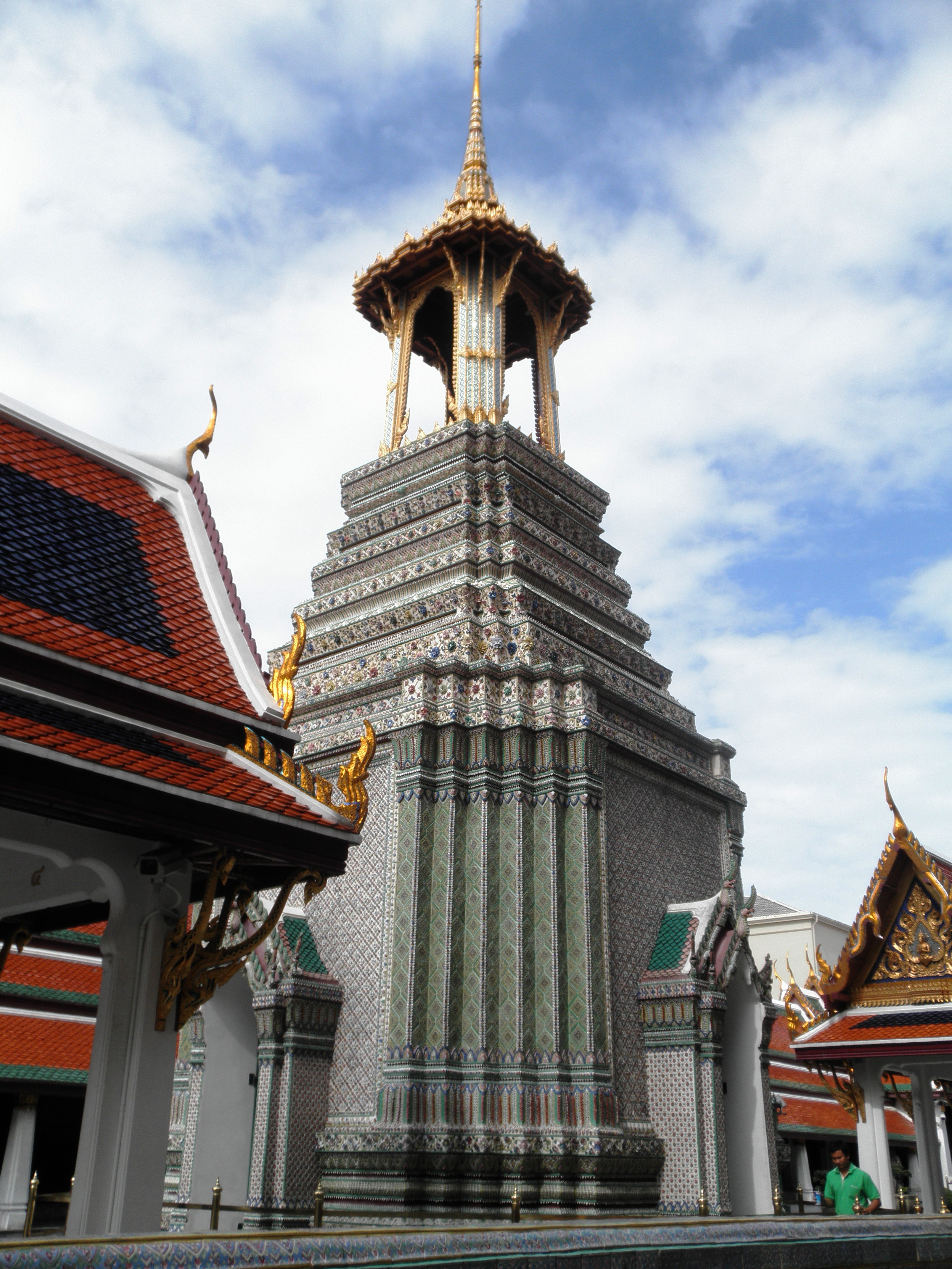 Wat Phra Kao